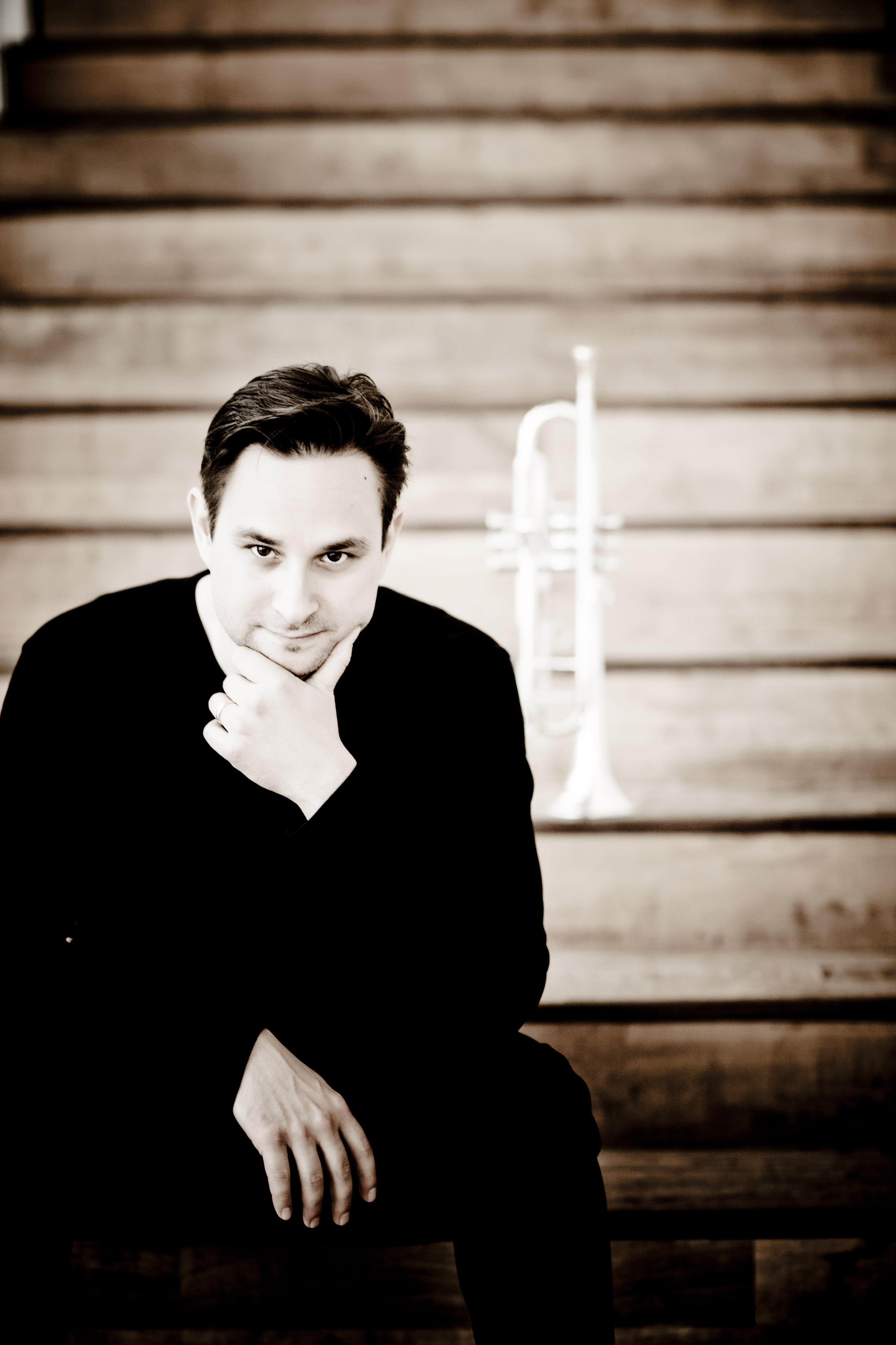 Gabor Boldoczki, ungarischer Trompeter, 2010